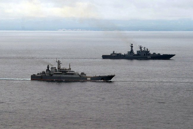 Комплексная проверка войск Восточного военного округа. Сахалинская область.